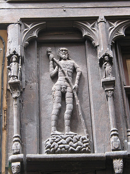 Sculpture de façade en bois représentant un homme sauvage avec un bâton